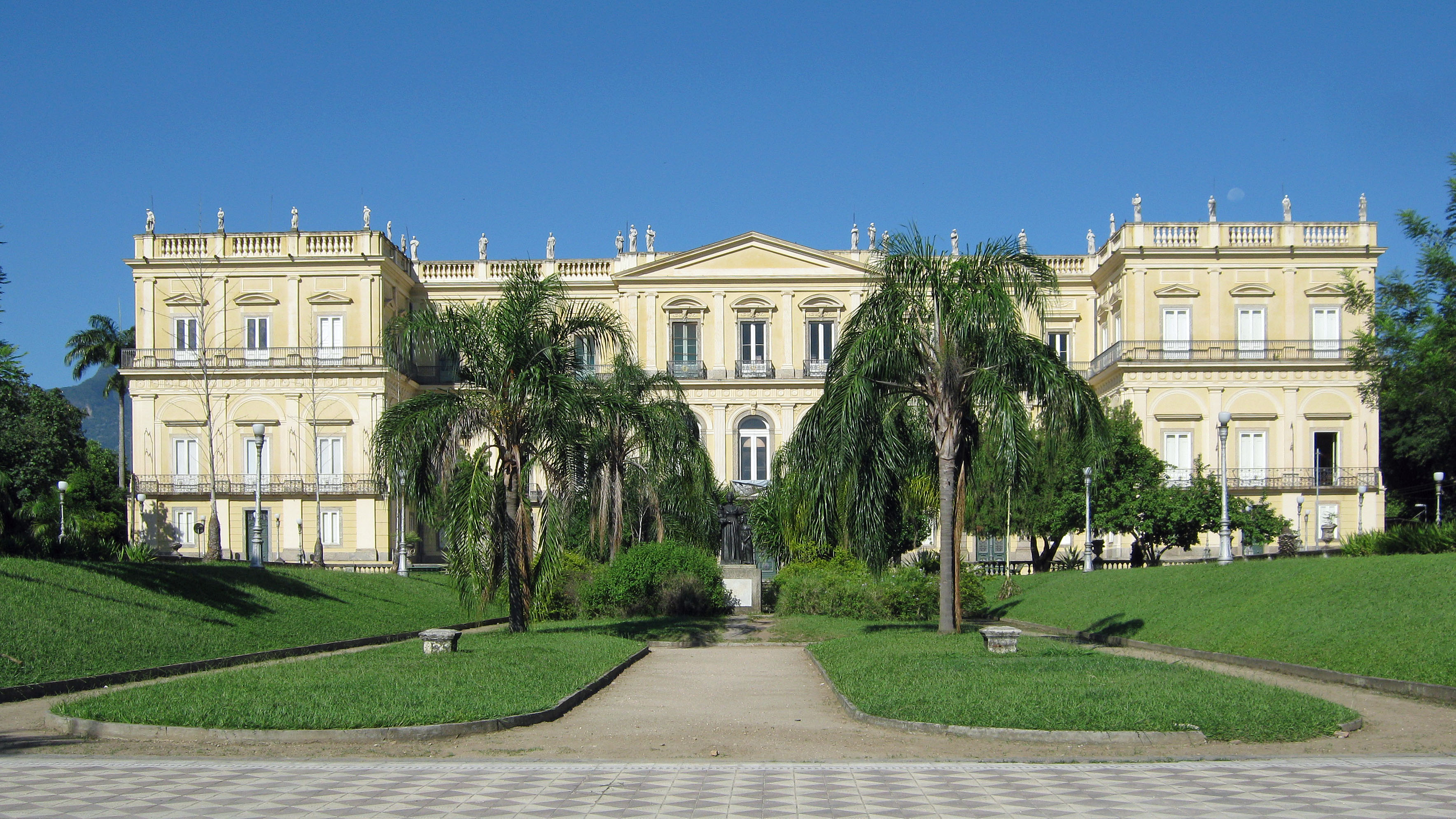 Palácio de São Cristóvão na Quinta da Boa Vista, atual Museu Nacional da Universidade Federal do Rio de Janeiro.